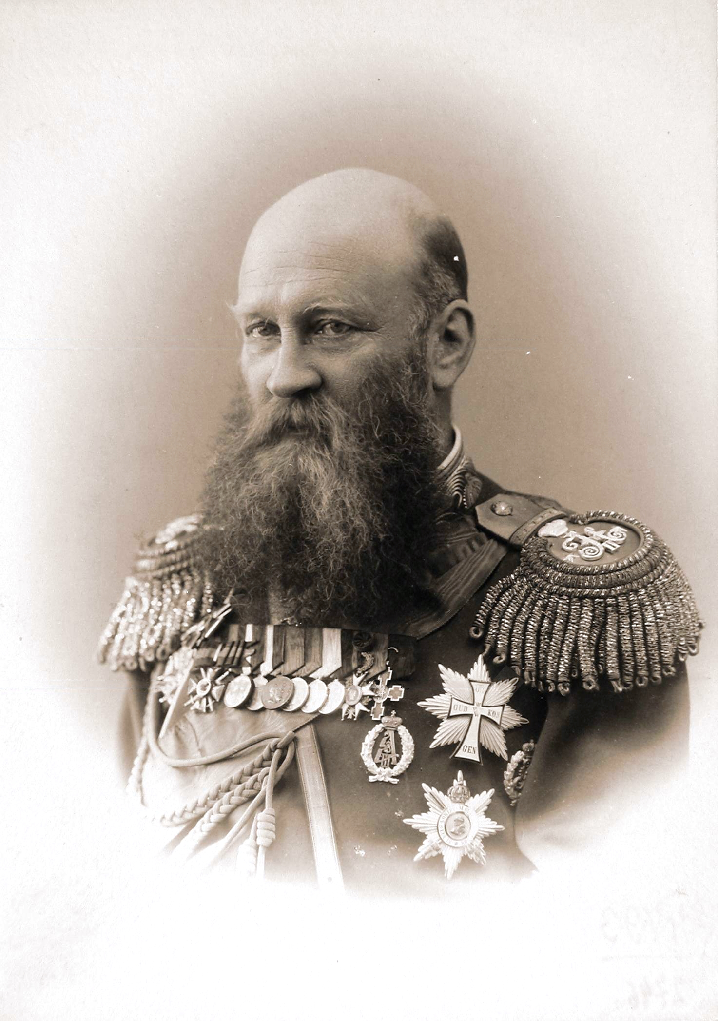 Князь Барятинский Владимир Анатольевич (1843-1914)